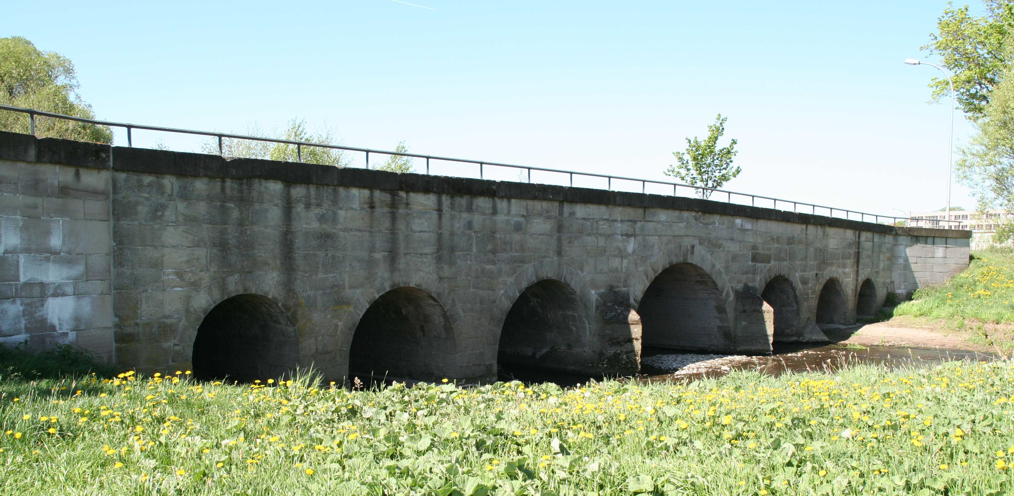 Werrabrücke in Schackendorf, Ortsteil von Veilsdorf, Landkreis Hildburghausen